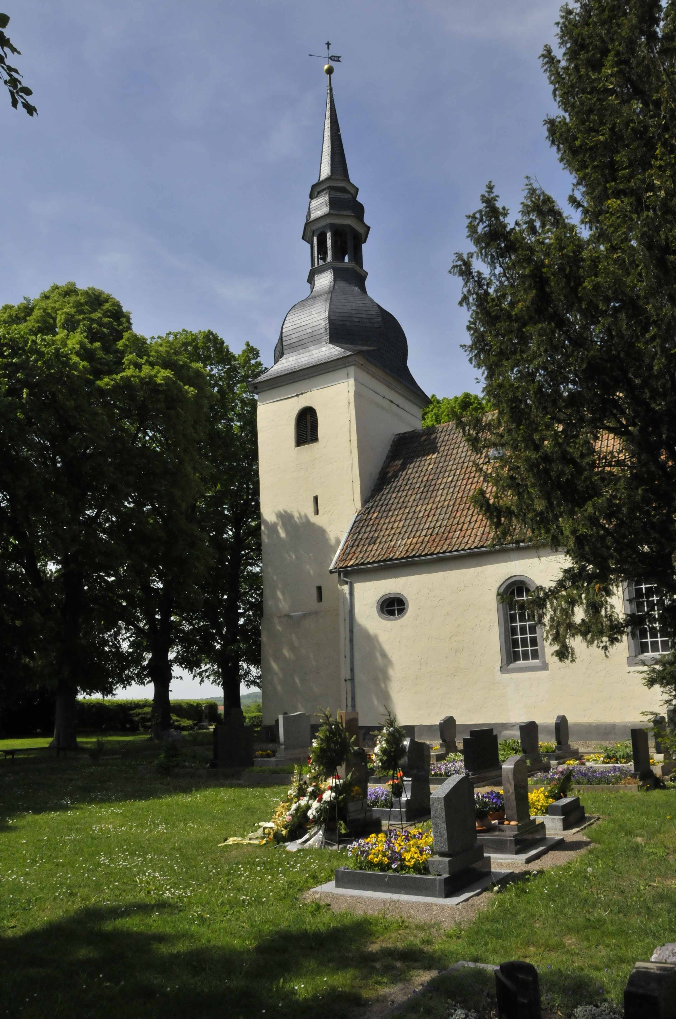 Kleinurleben, Kirche